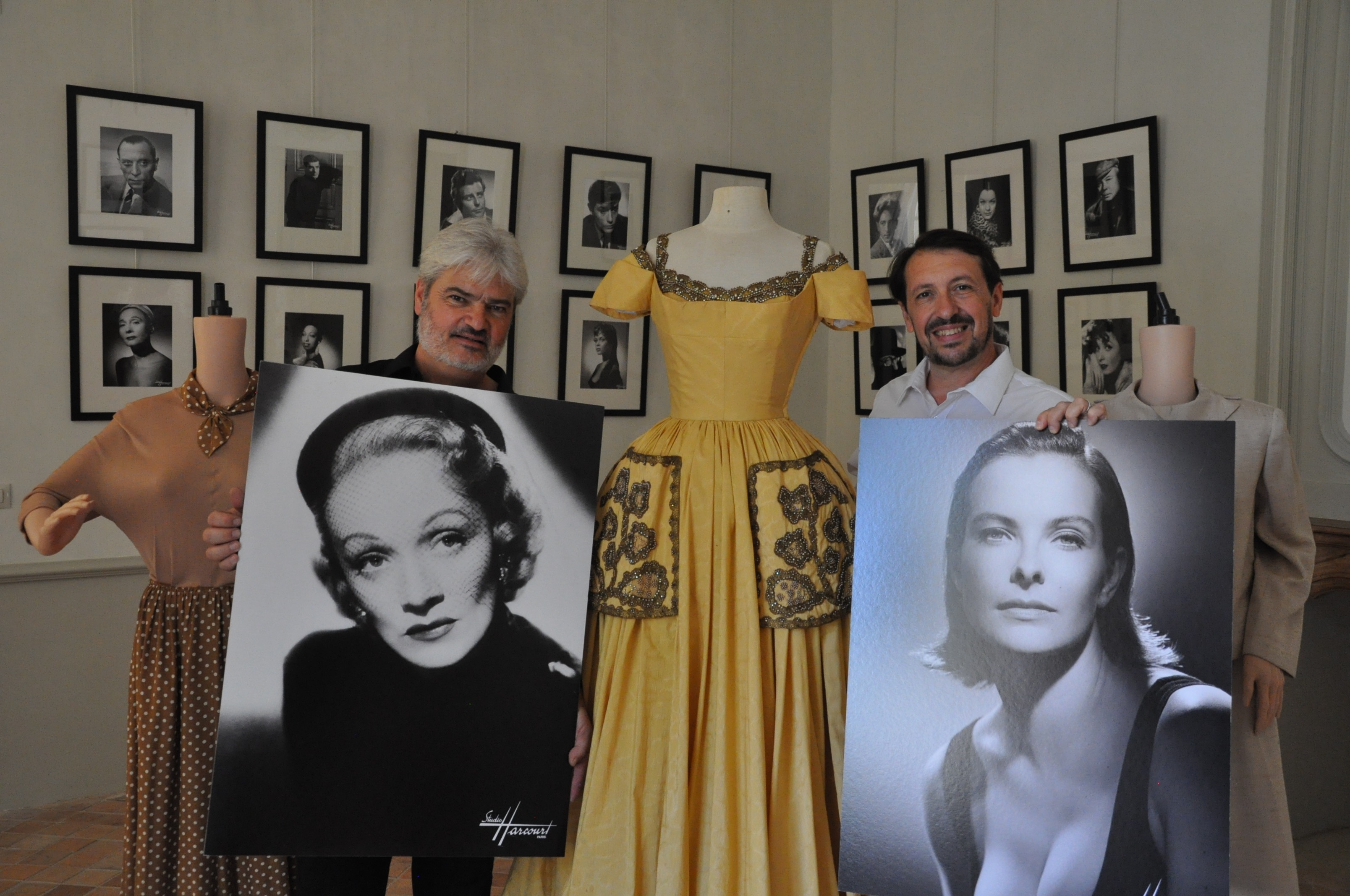 10 eme edition Photo Studio-Harcourt et Collection Bruno Gobin